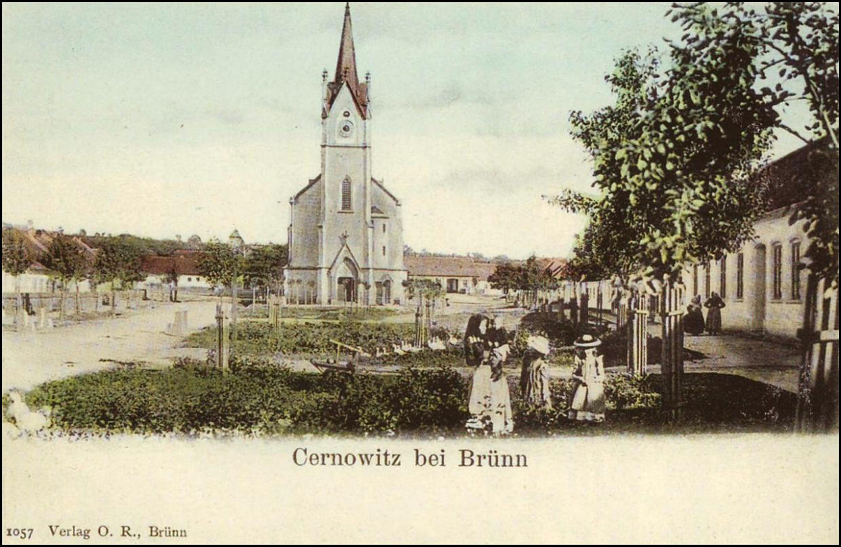 Náves (dnes Faměrovo náměstí) s kostelem svatého Floriána v Brně-Černovicích